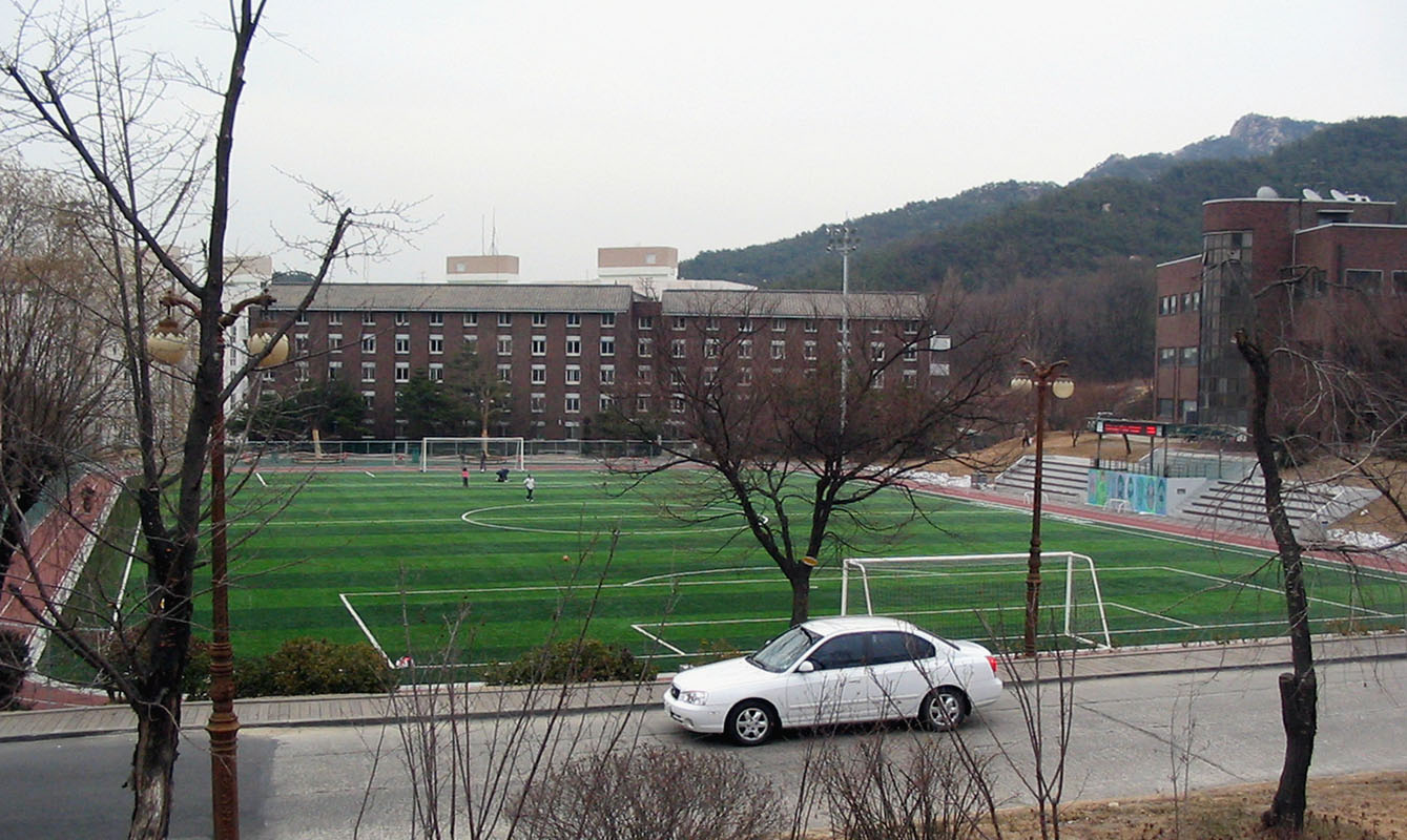 서울대학교 관악사 운동장